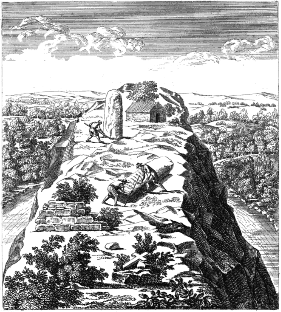 Gravure publiée en 1812 par Armand Maudet de Penhouet, présentant les bornes milliaires de Castennec (disparues depuis) : Cette sixième planche offre l'extrémité de la plate-forme de la montagne dont on voit la vue, planche quatrième. Ici je me suis attaché à guider les pas de celui qui me suit en idée dans m'a visite sur la montagne ; je lui montre la vue du pilier à droite qui porte l'inscription page 28 ; celle de celui qui était encore debout et que j'ai fait renverser ; les ruines de la chapelle du Prieuré de la Couarde. On verra que c'est à la porte de cette église qu'ont dû être placés la statue et le tombeau ; d'où il y a lieu de croire que le temple payen occupait l'emplacement de cette chapelle. p. VI